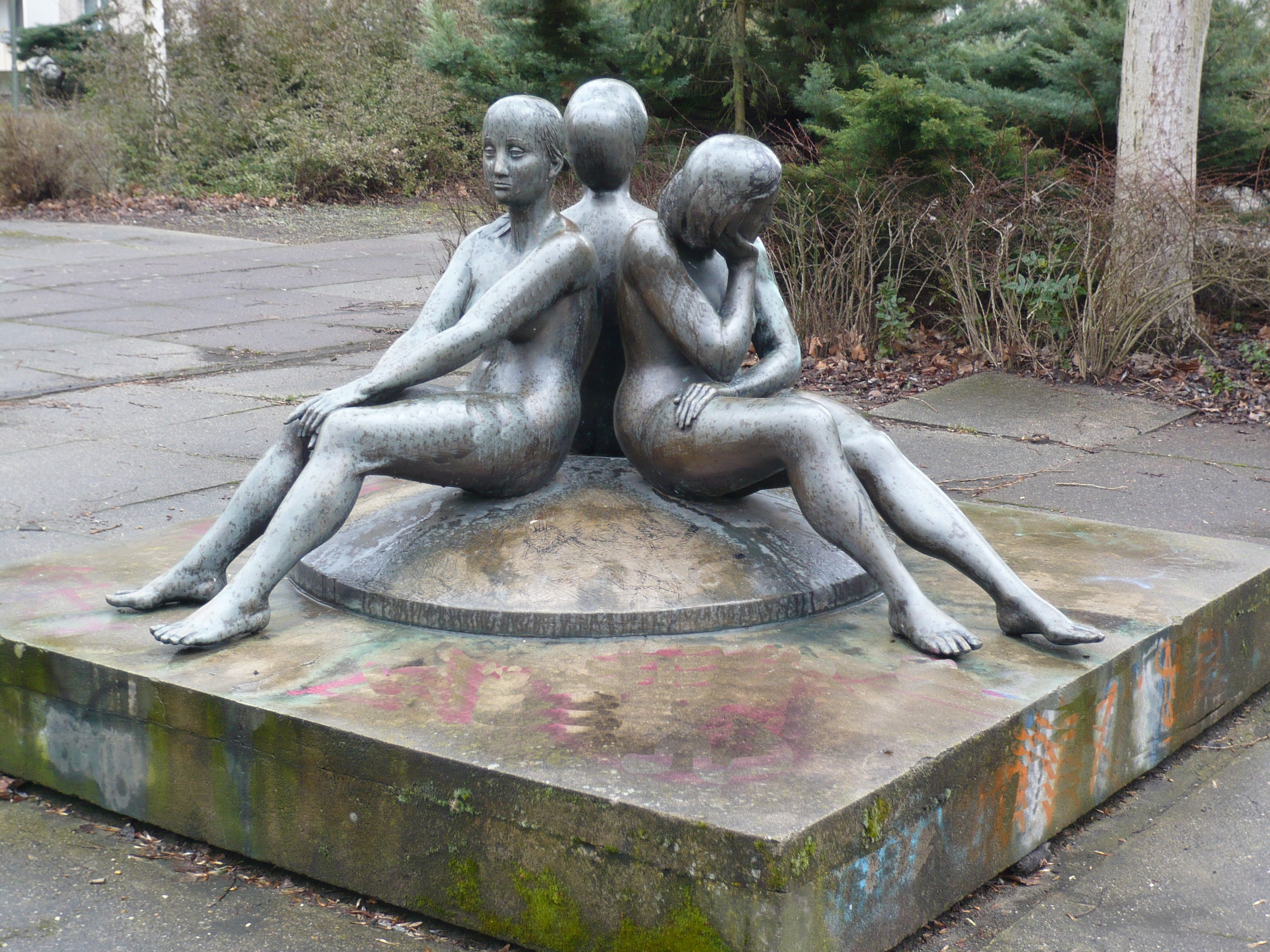 Berlin-Prenzlauer Berg, Bronzegruppe Drei Grazien